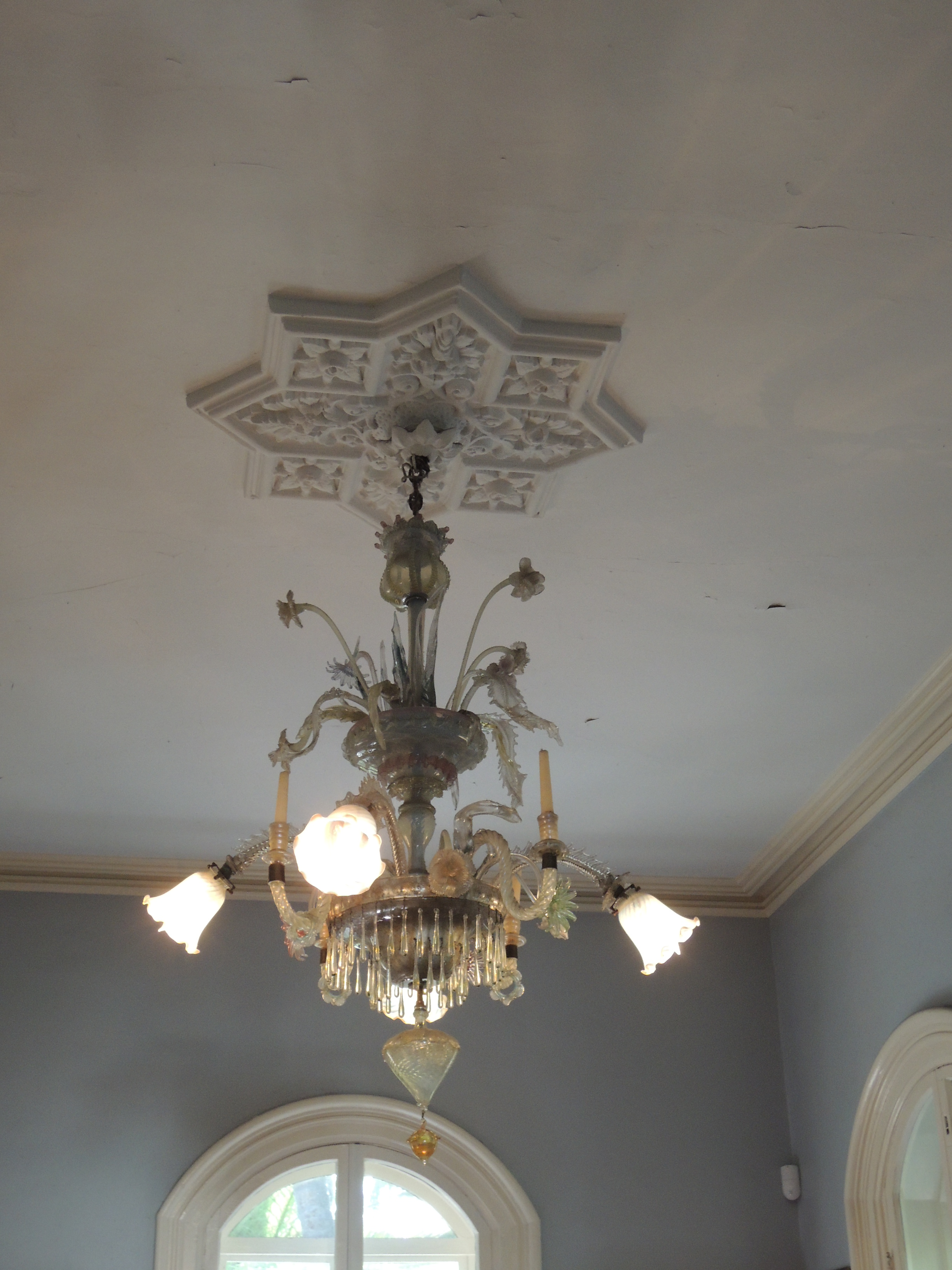 Un chandelier dans une pièce de la maison d'Ernest Hemingway.